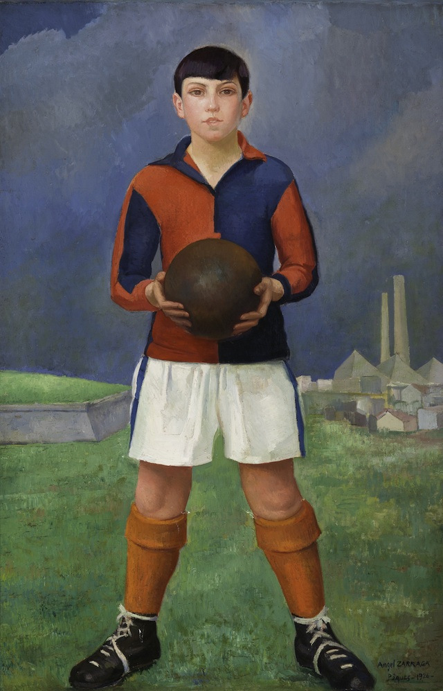 Ángel Zárraga (y) Argüelles (1886—1946). 'Joven futbolista' 1926 (Óleo sobre lienzo)